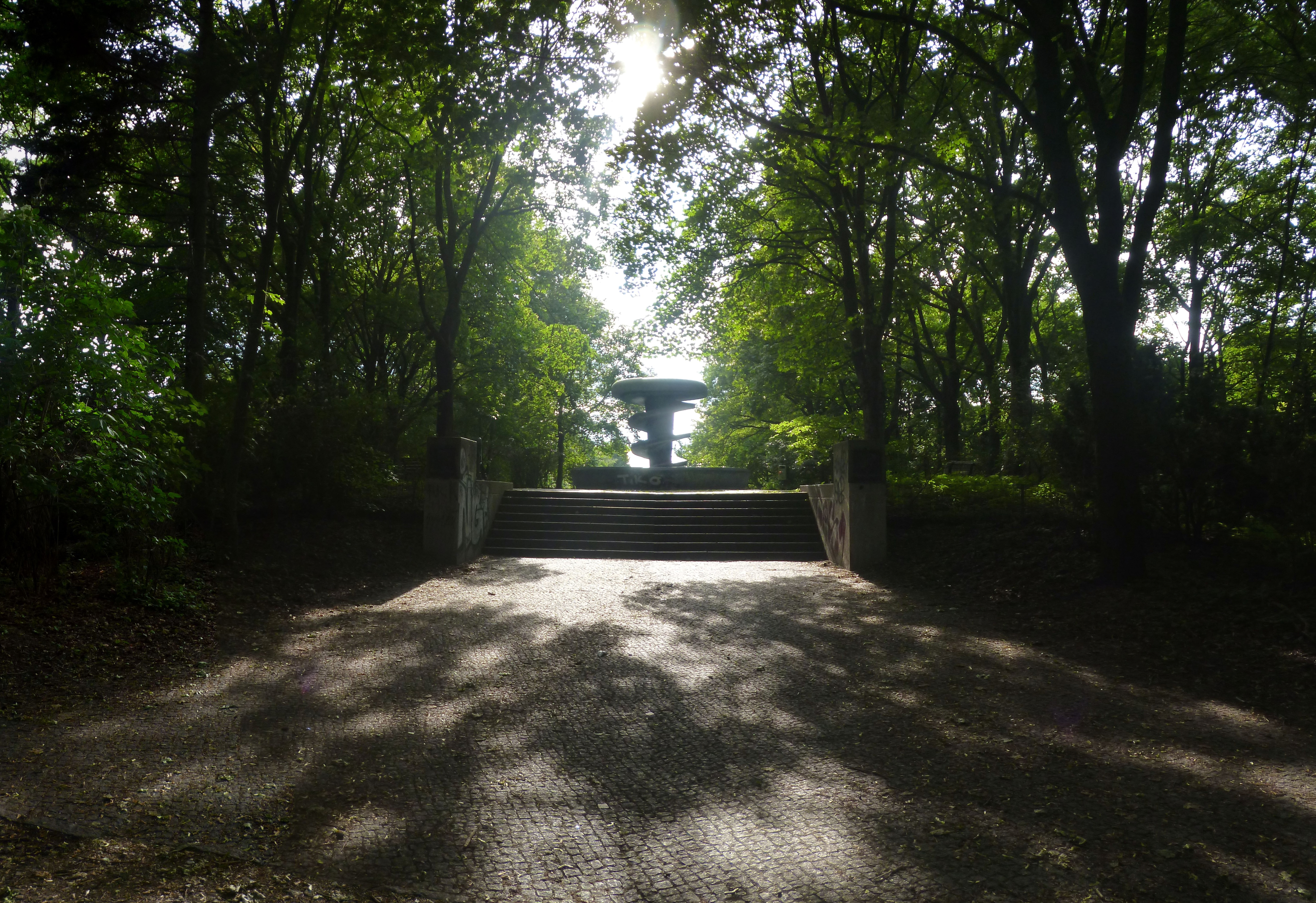 LSG-6 Volkspark Rehberge Berlin Mitte - Blick auf das Rathenau-Denkmal (Juni 2014).